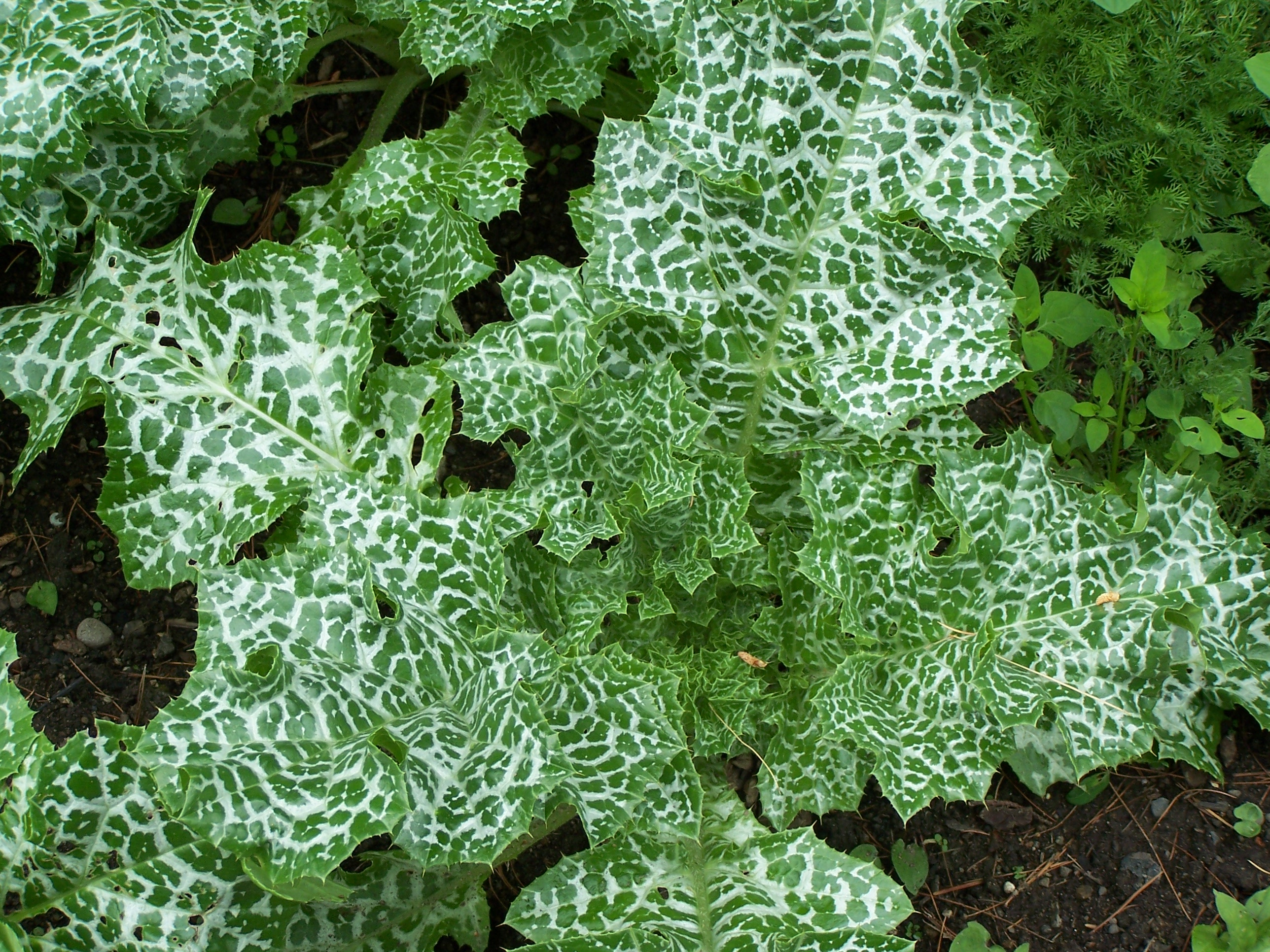 Silybum marianum 17 juin 2006 Vieux jardin botanique de Göttingen